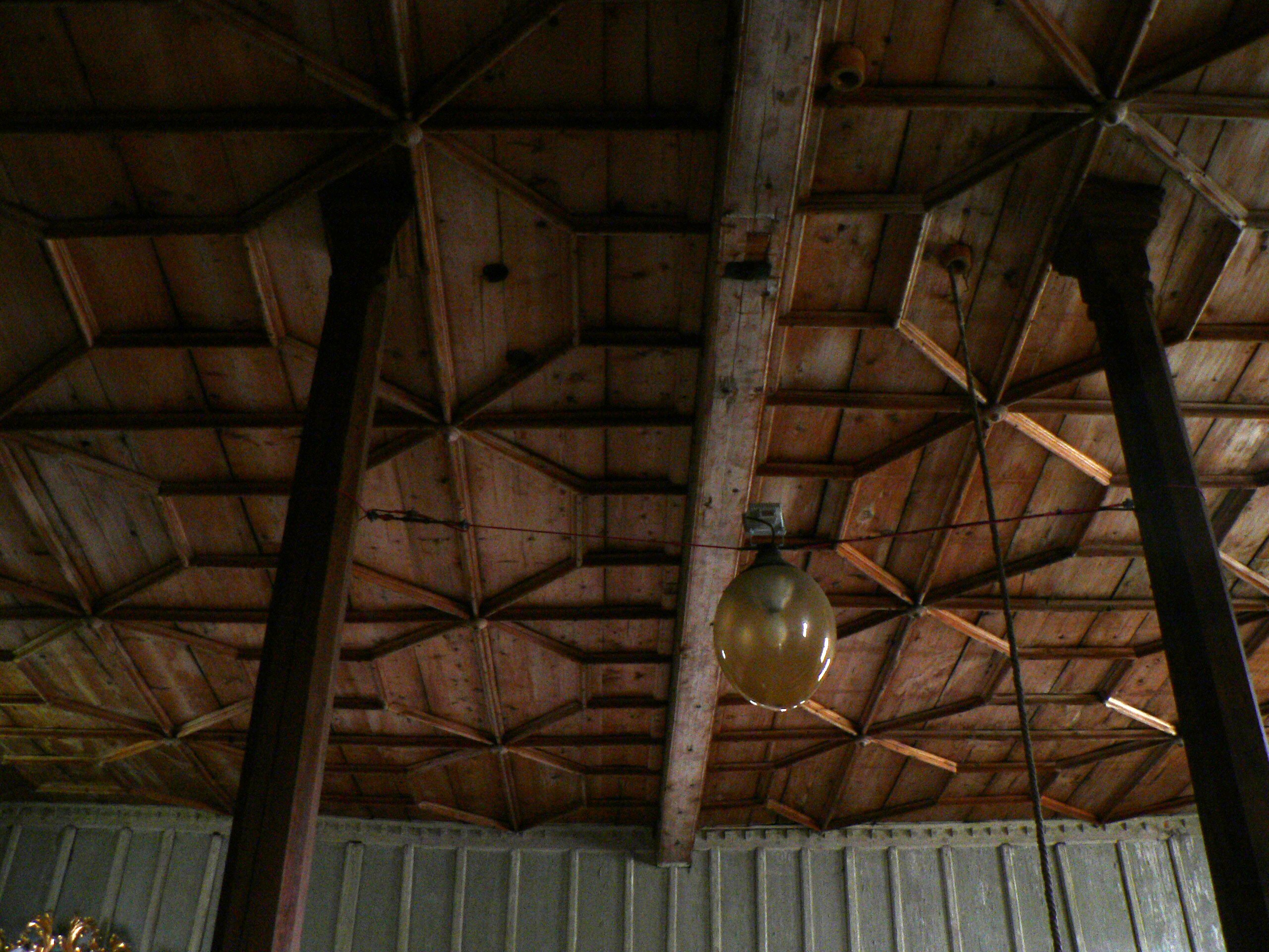 Kostel sv. Michala v Maršíkově, strop